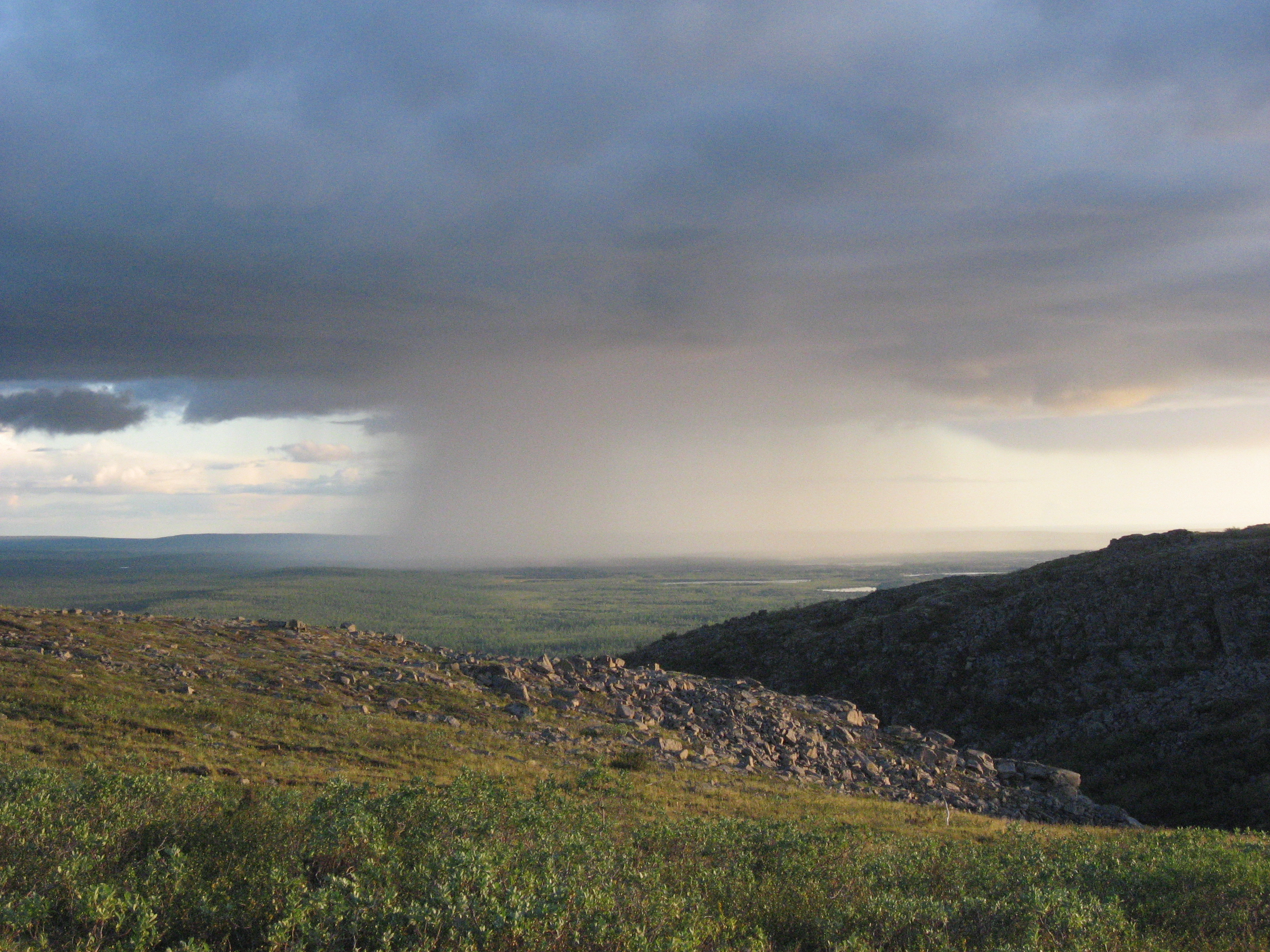 Дождь